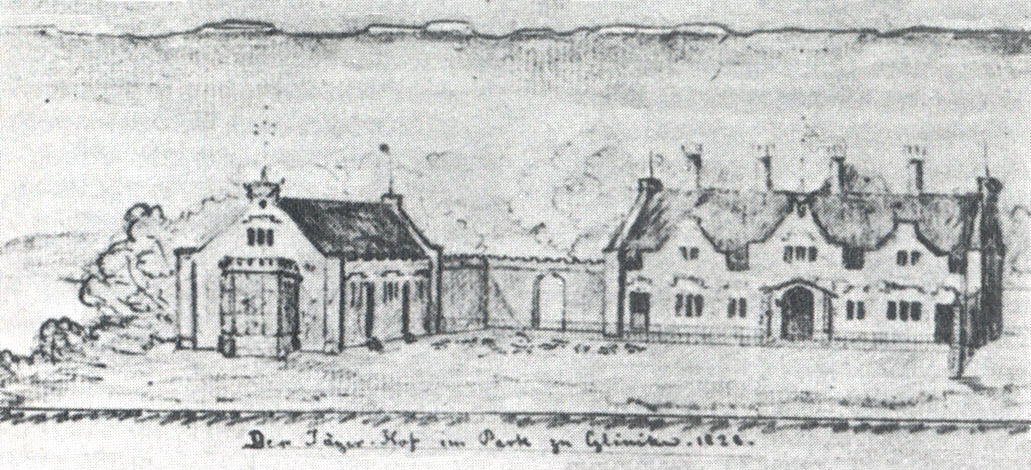 Erster Entwurf zum Jägerhof in Klein-Glienicke